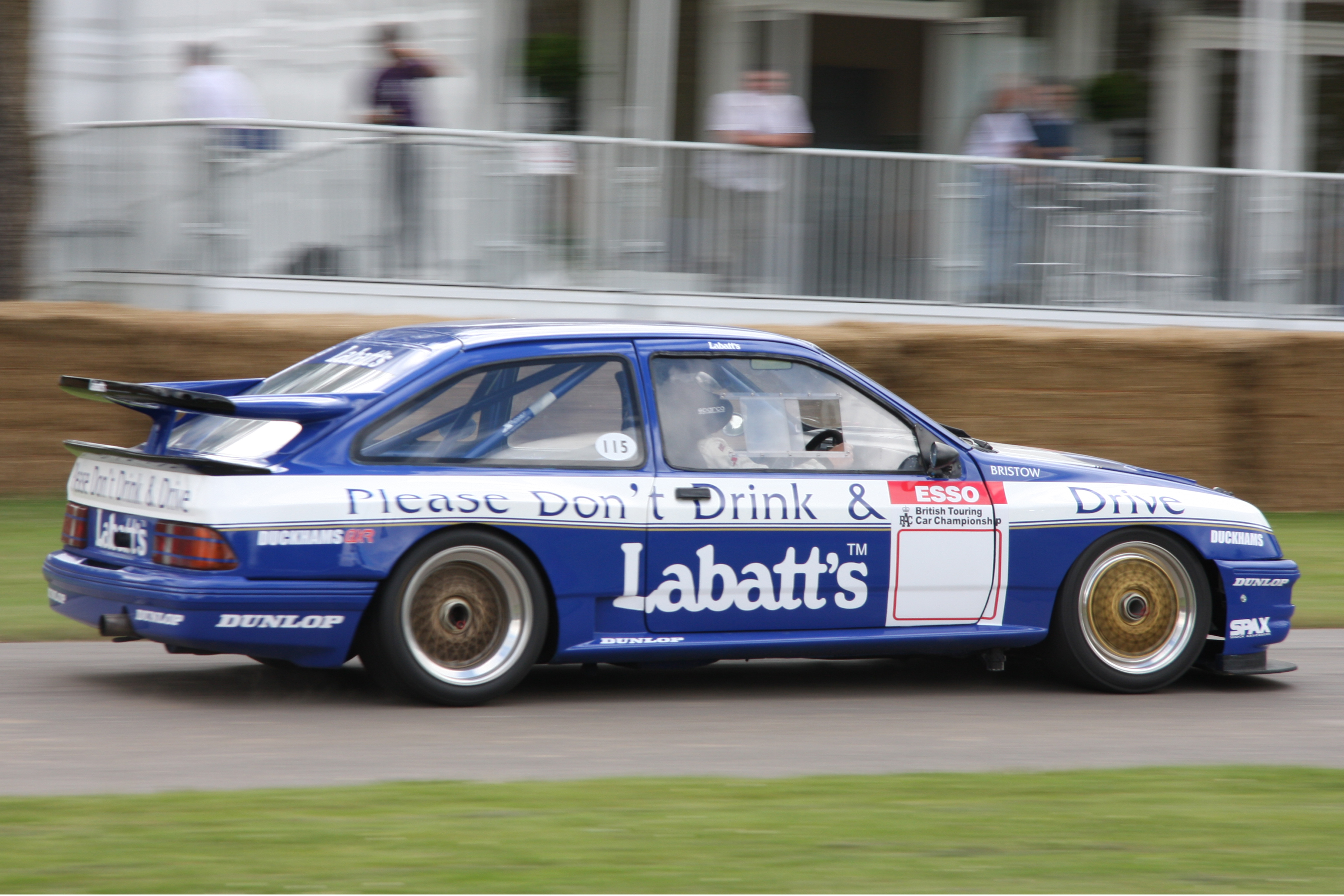 Built 1990. 2 litre 4 cylinder